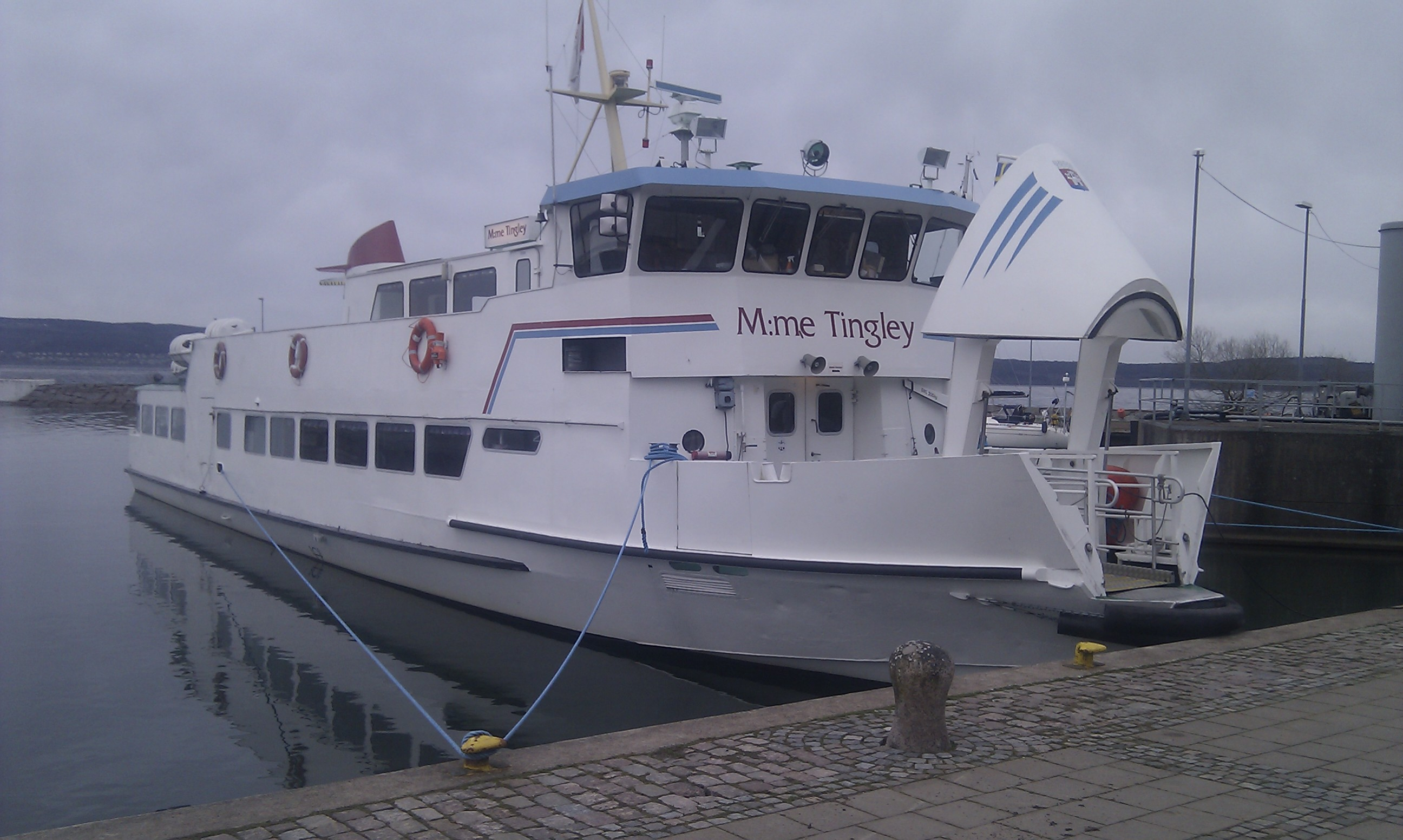 Passagerarfartyget Madame Tingley, som trafikerar Visingsöleden